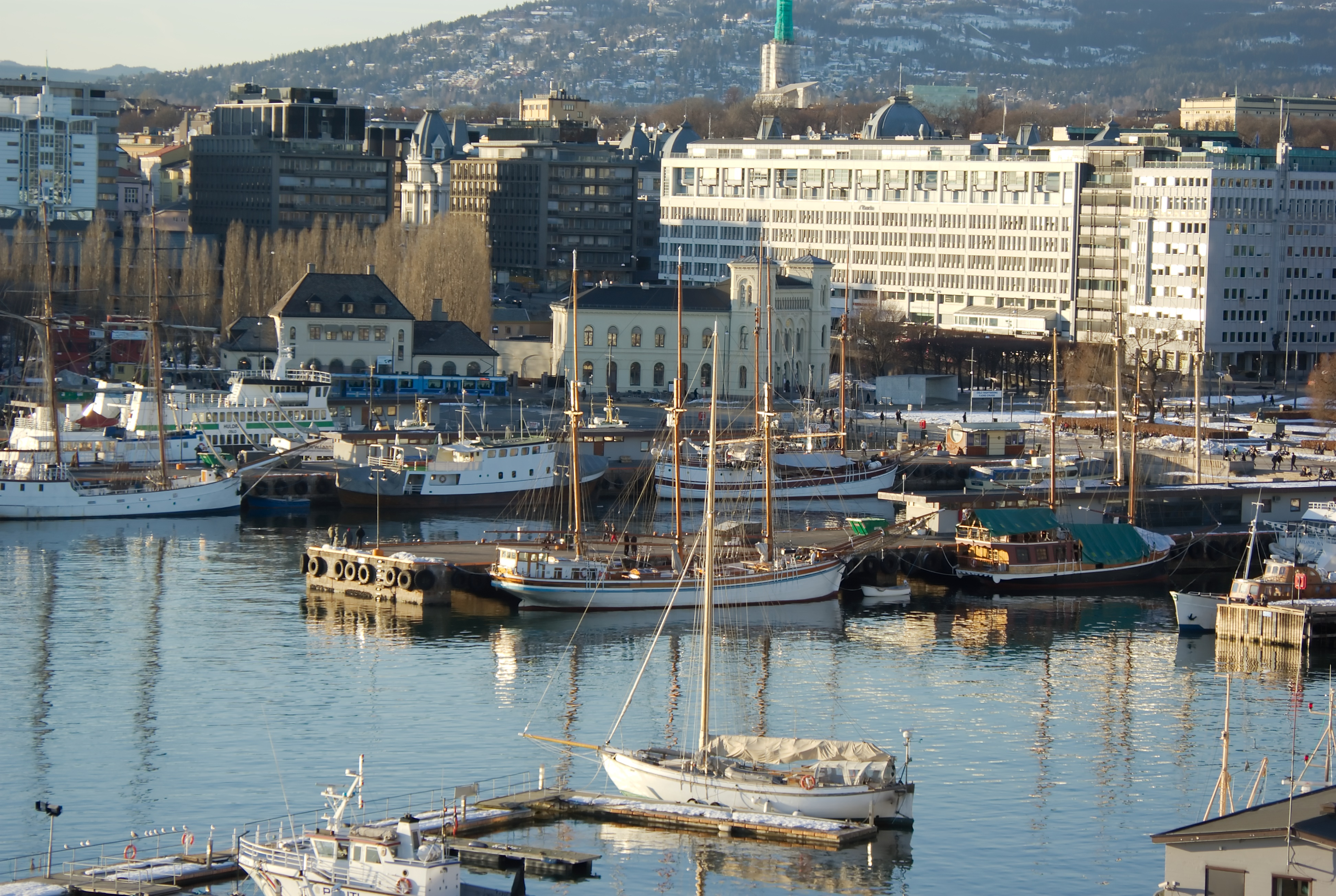 Oslo havn.